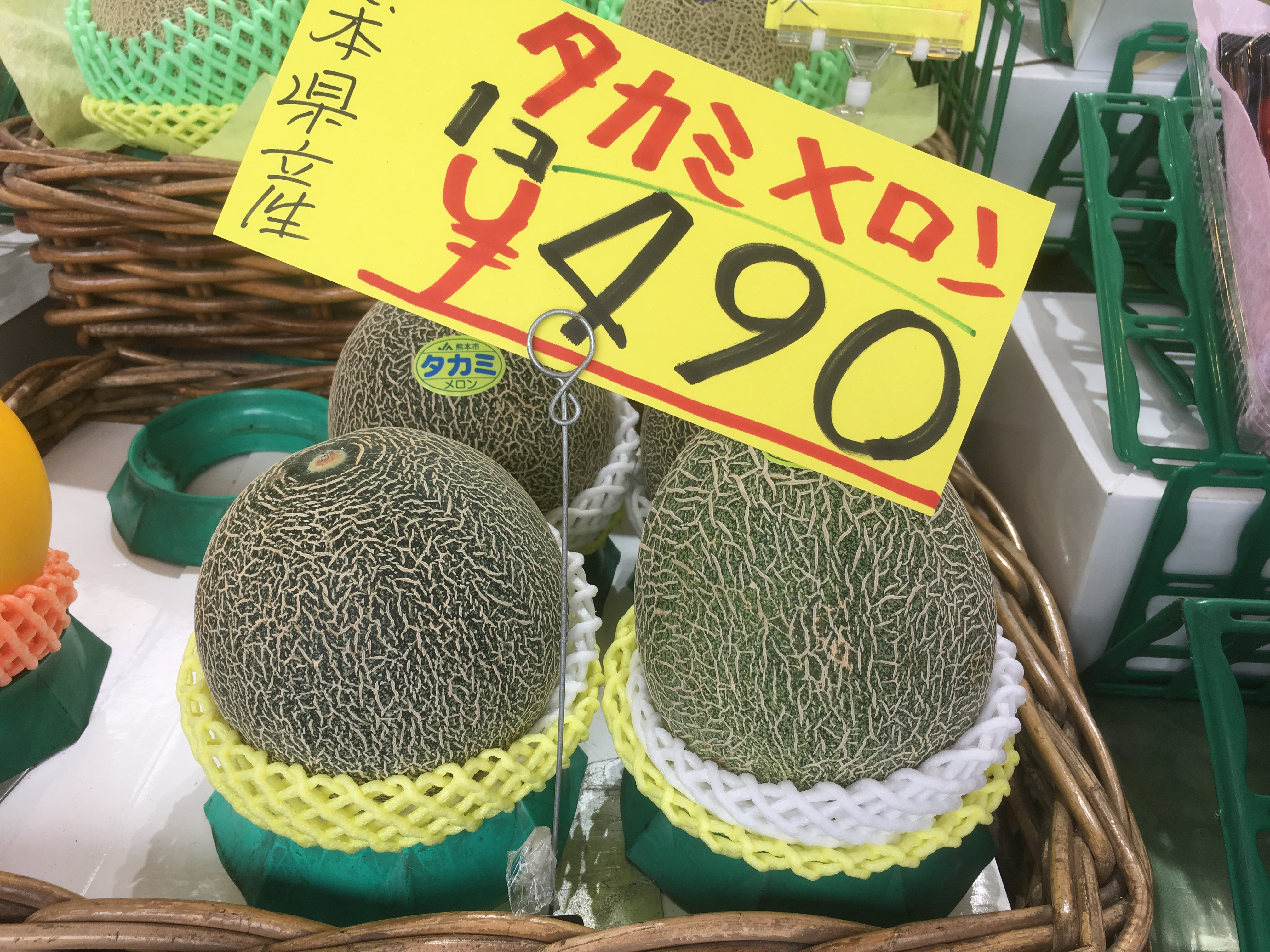 タカミメロン (Takami melon)